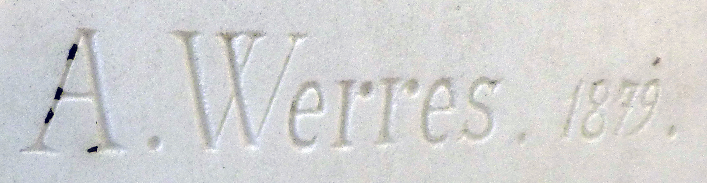 Marmorbüste von Franz Weber mit Signatur vom Künstler Anton Werres auf dem Kölner Melaten-Friedhof. Künstler: Anton Werres (1830–1900) DescriptionGerman artistdeutscher BildhauerDate of birth/death 1 January 1830 27 April 1900Location of birth/death Cologne CologneWork location Cologne, RomAuthority control : Q15729050 VIAF: 81616740 ISNI: 0000 0000 6689 7990 ULAN: 500088900 GND: 137423101 creator QS:P170,Q15729050